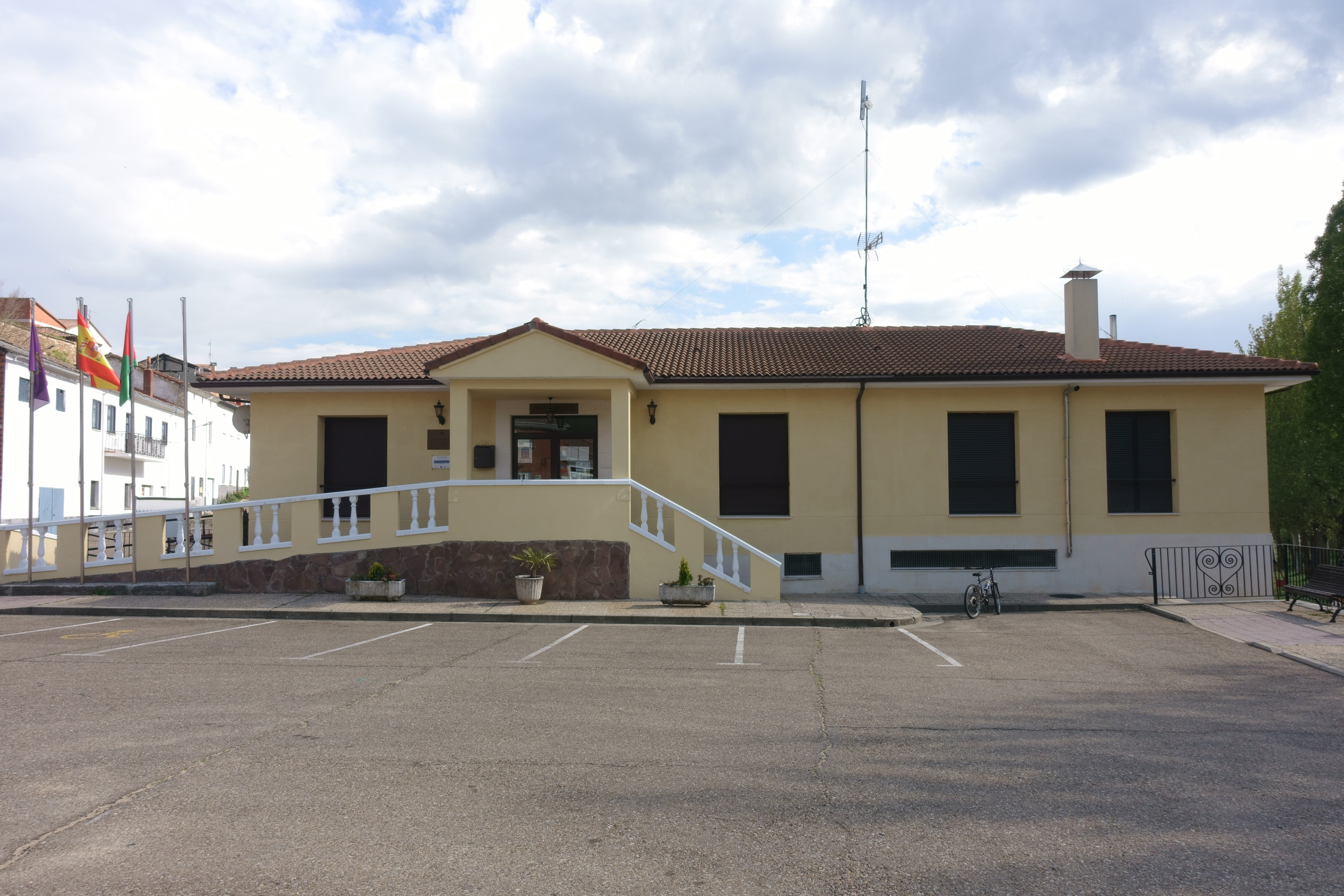 Casa consistorial de Villalba de Guardo (Palencia, España).